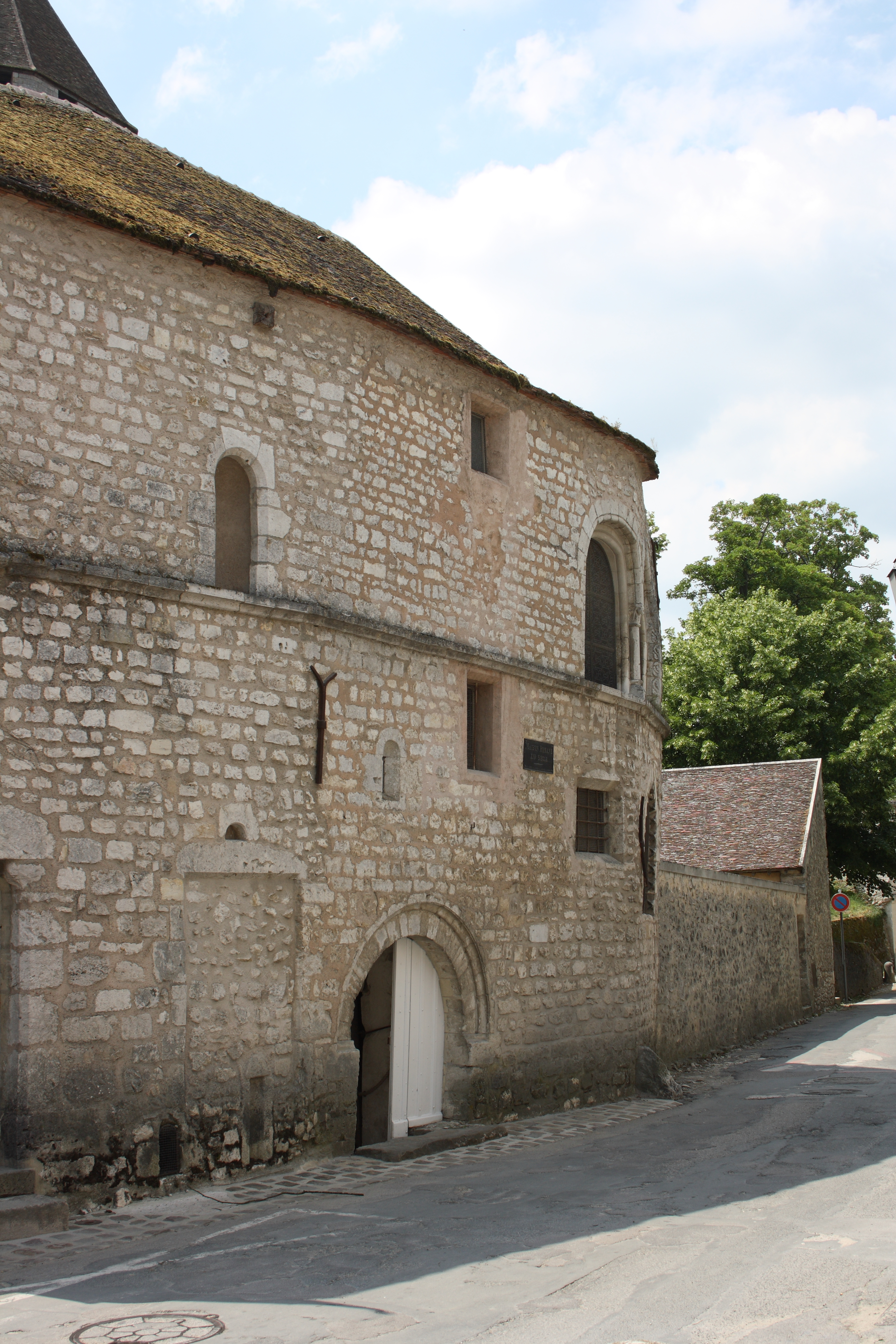 Maison romane in Provins, Rue du Palais (heute: Musée du Provins et du Provinois)